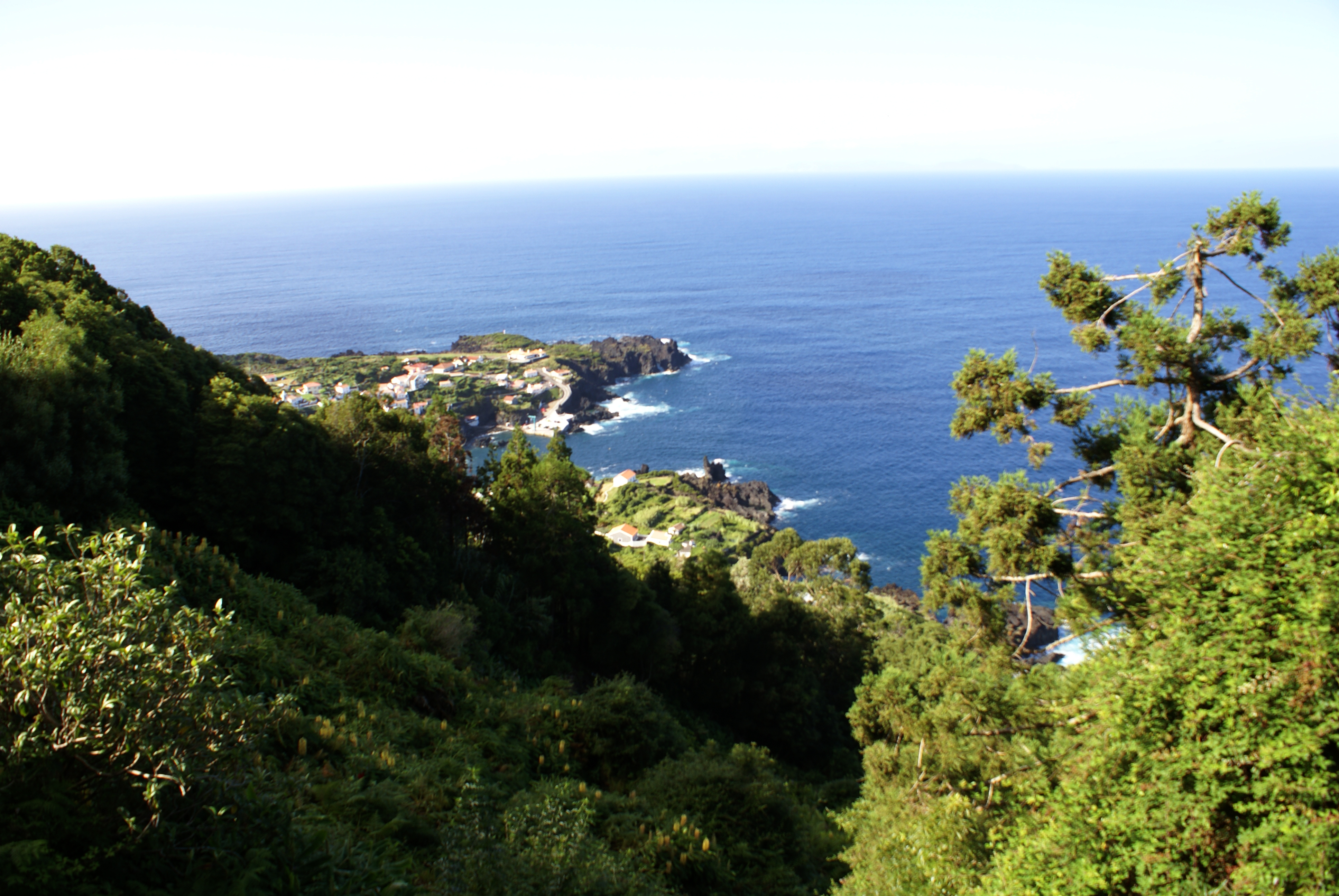 Fajã do Ouvidor, vista geral, Norte Grande, Velas, ilha de São Jorge